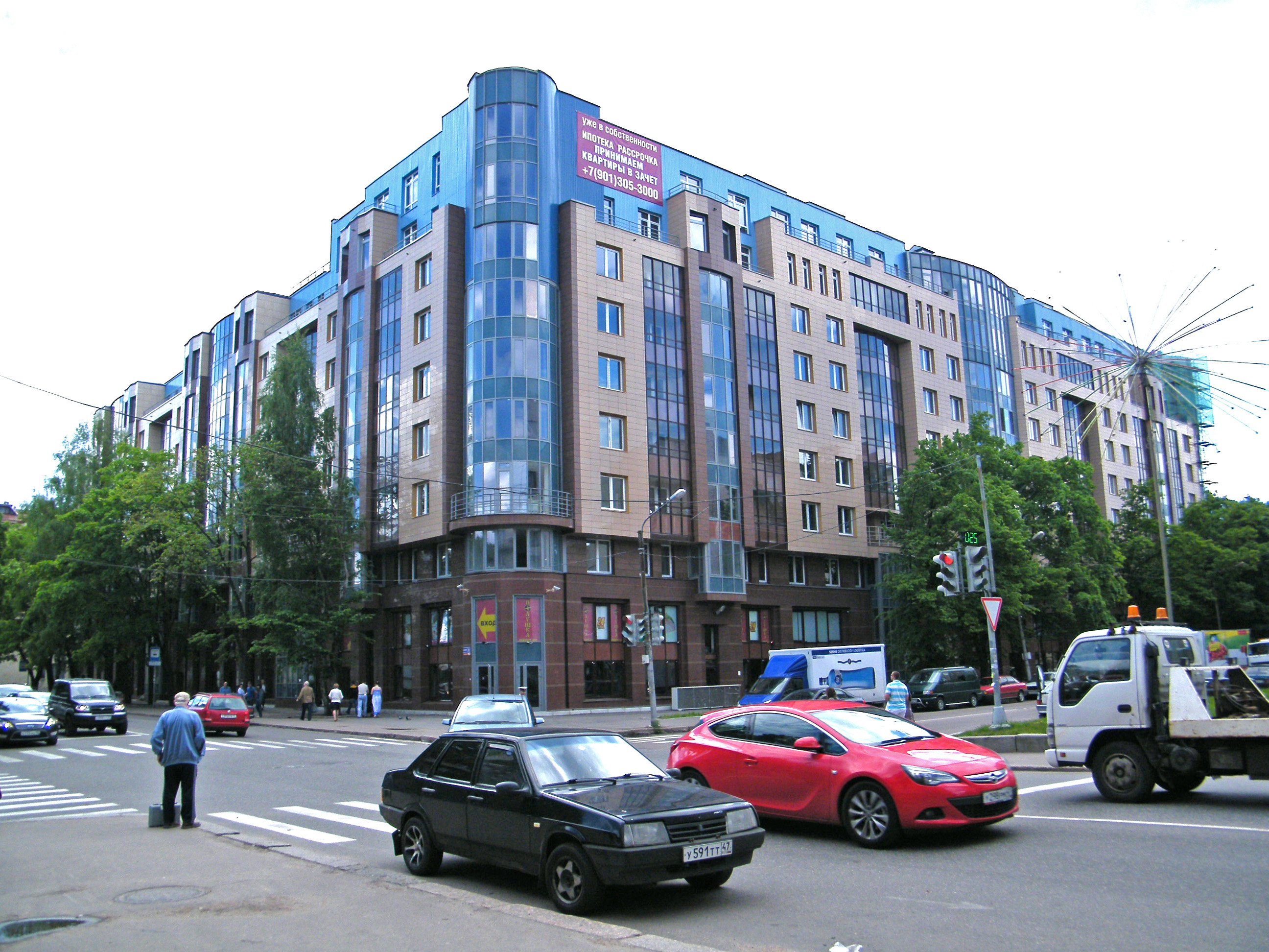 Новое жилое здание.